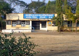 बंडोल